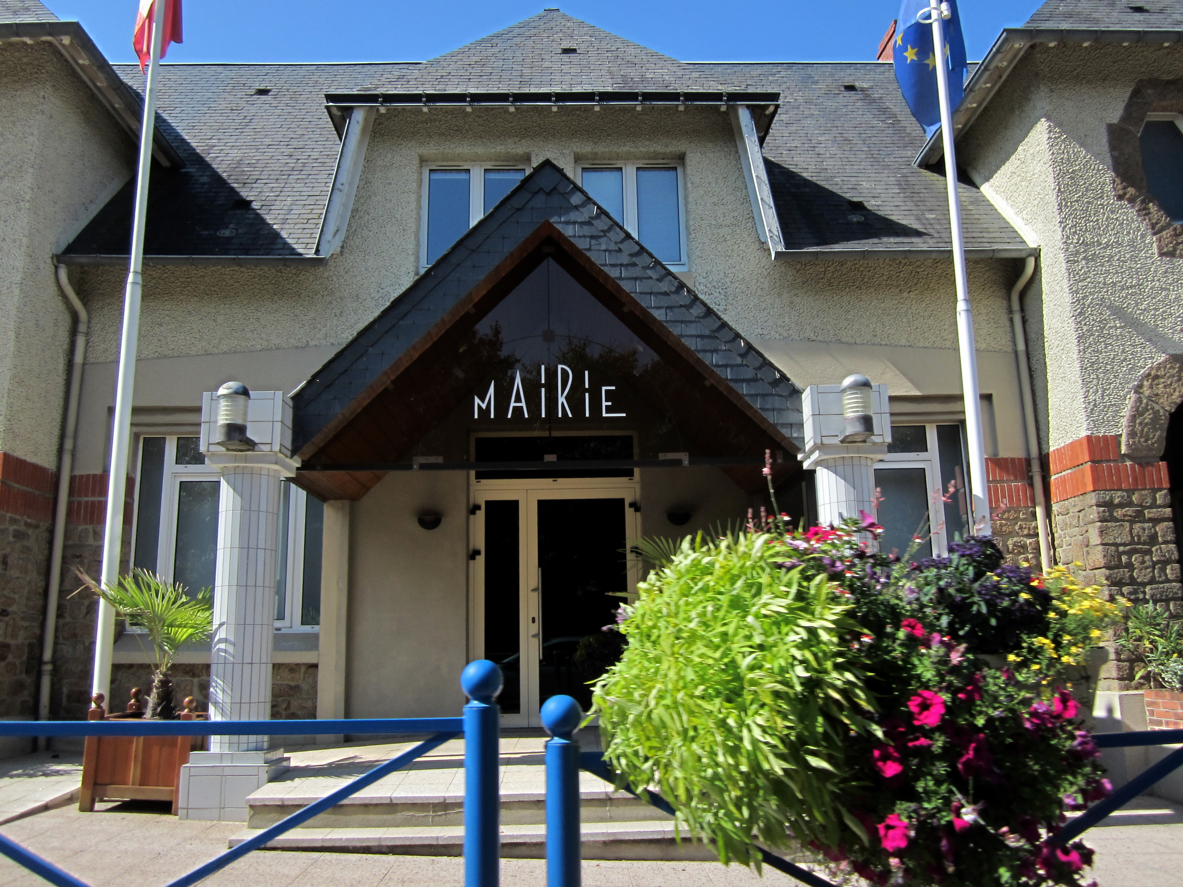 Parigny, Manche